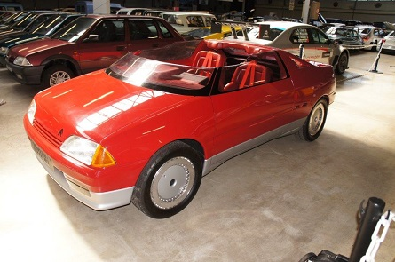 Citroën Xanthia 1986 Concept Car Citroën